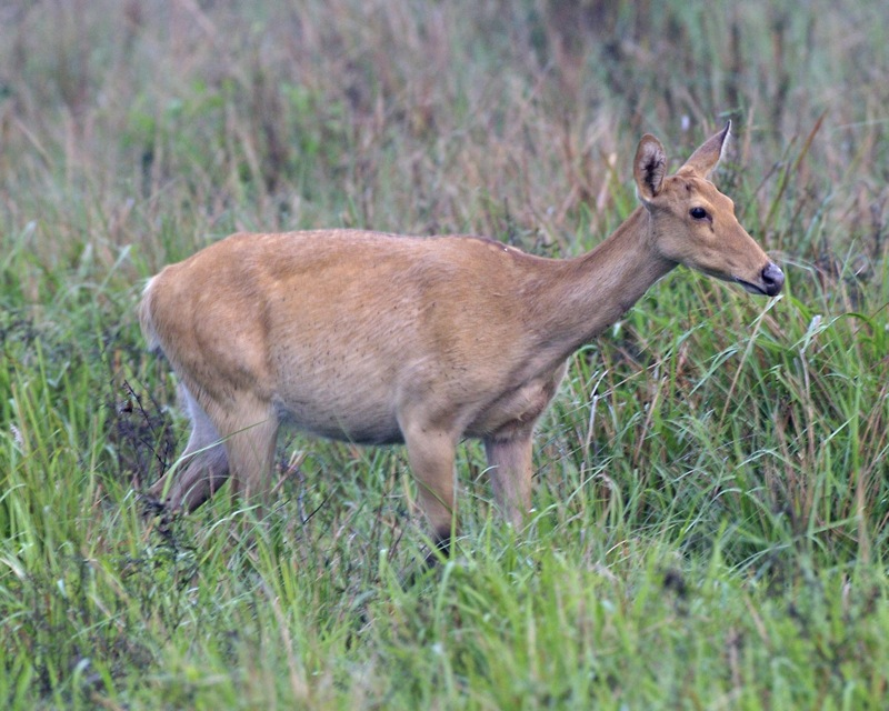 Elephant safari 690V3662.jpg